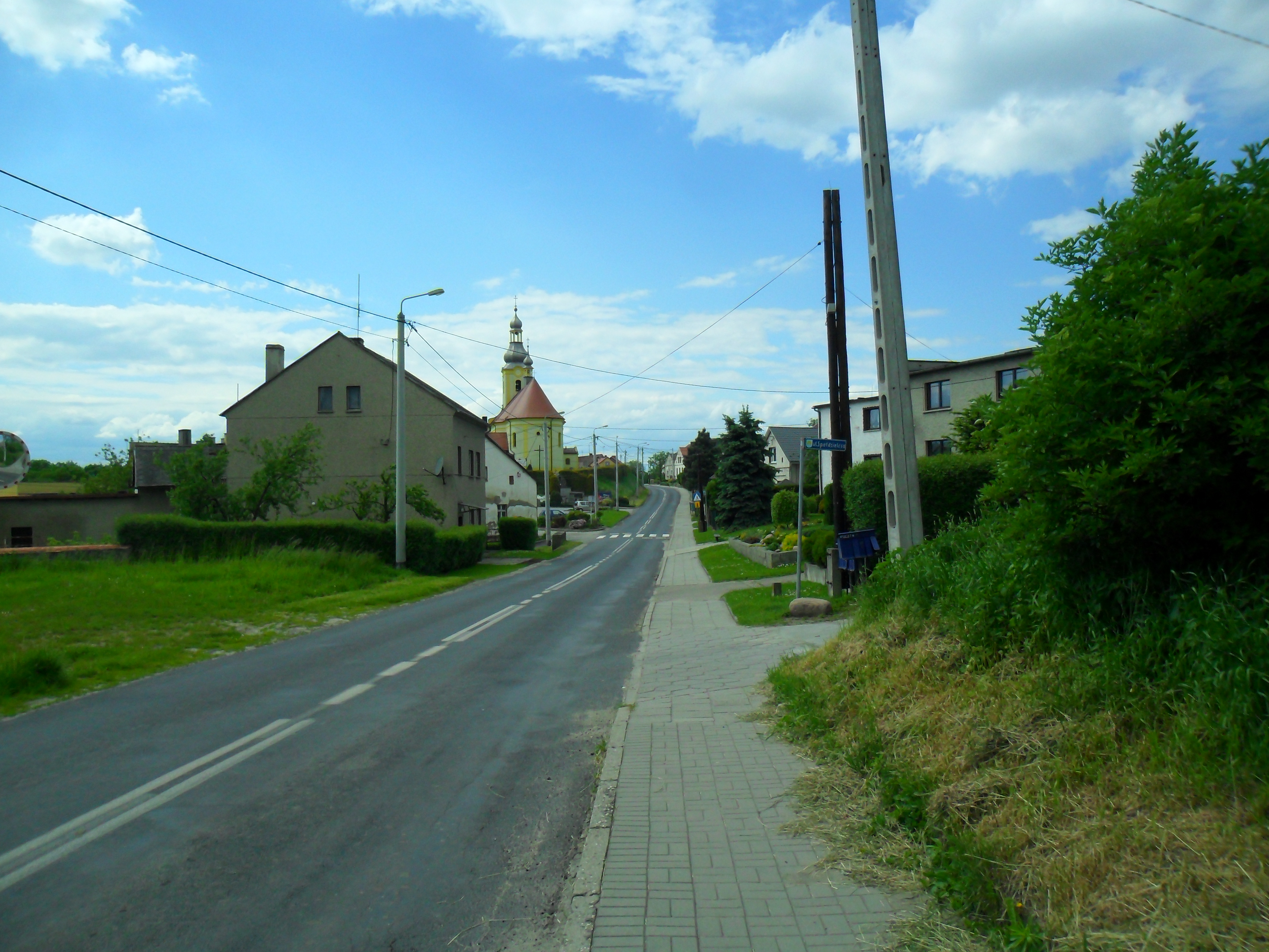 Maków, gmina Pietrowice Wielkie